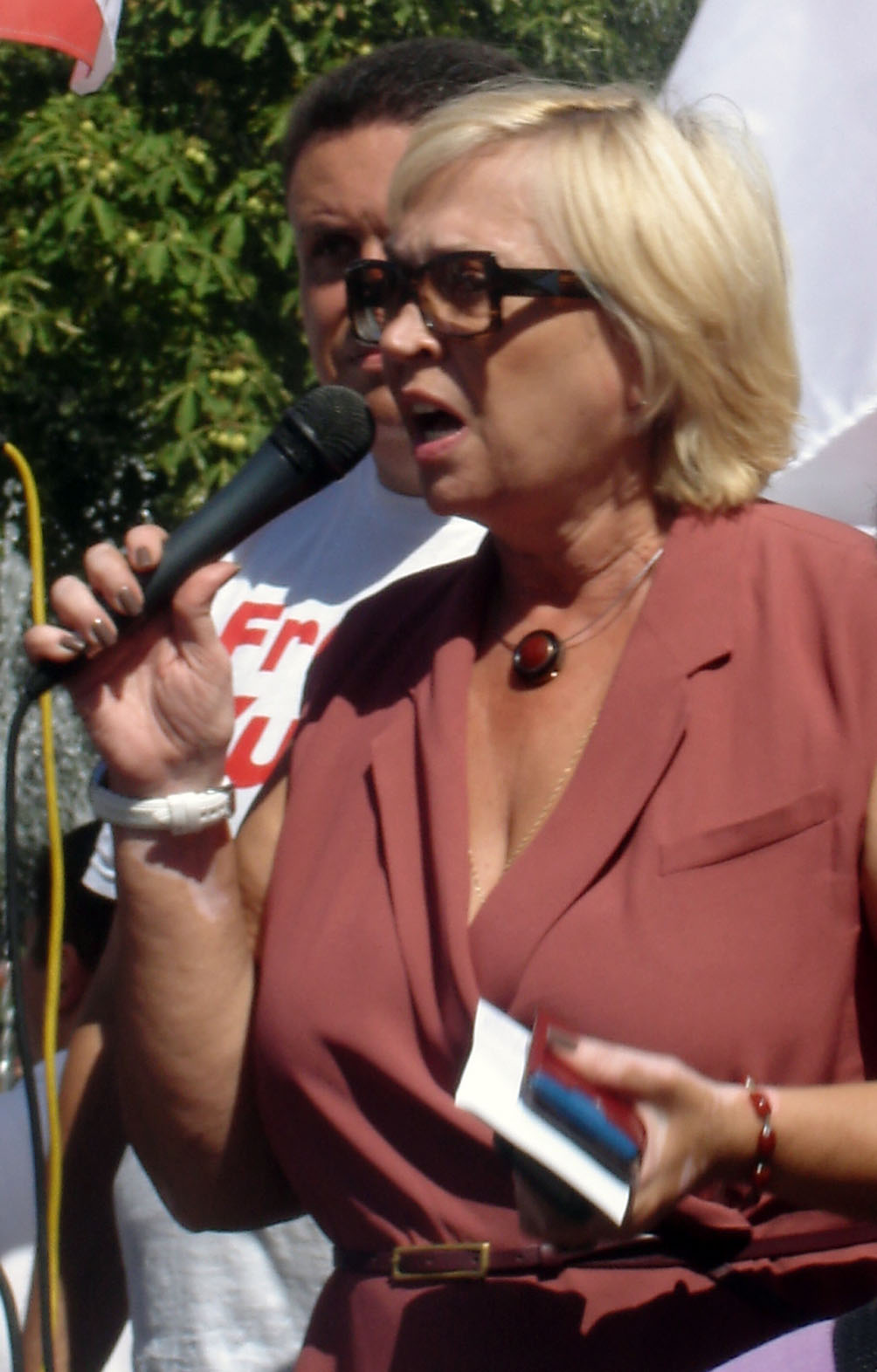 Олександра Кужель під час суду на Юлією Тимошенко (м. Харків)